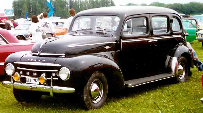 Volvo PV832 4-Door Sedan 1950